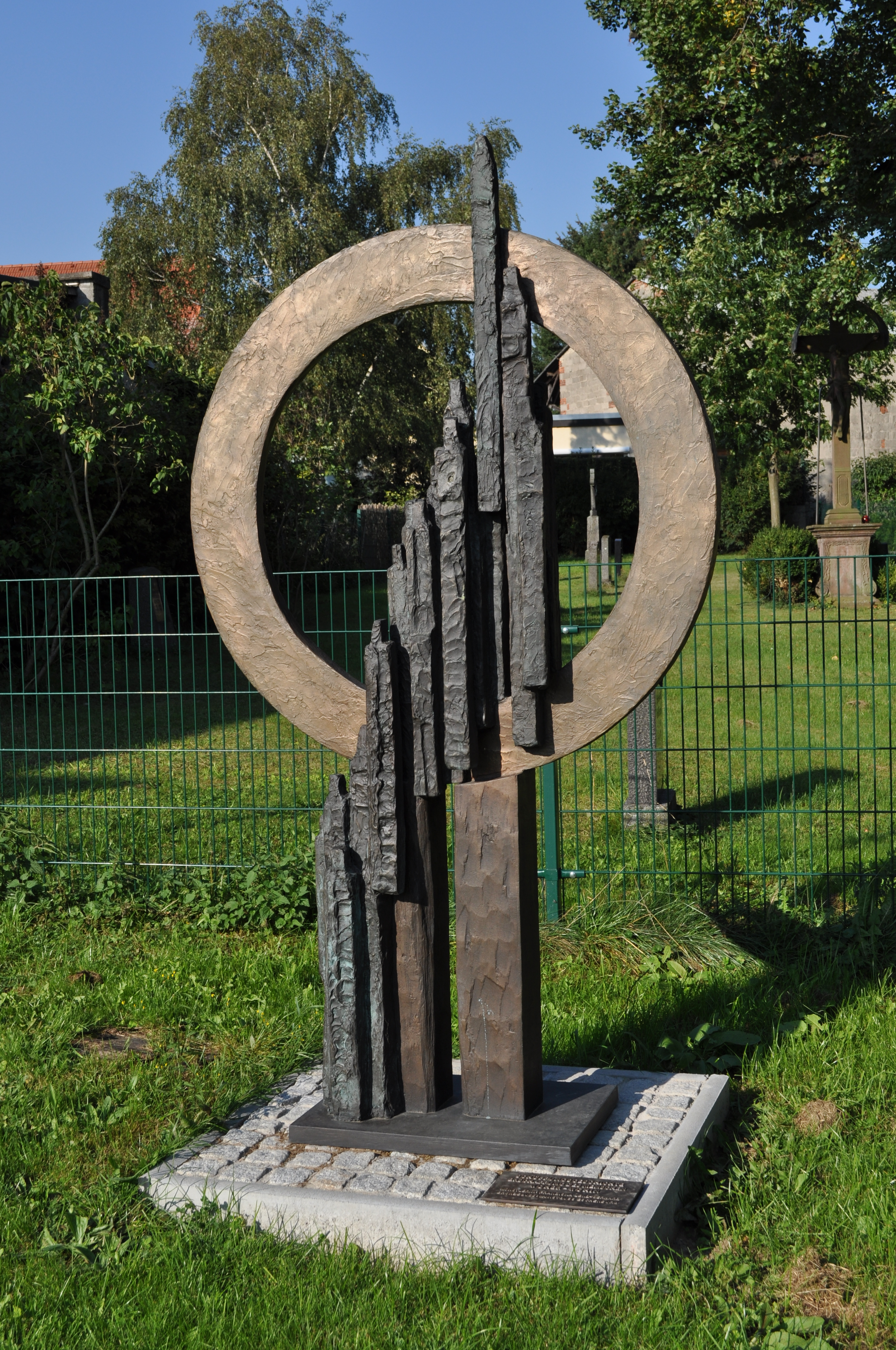 Kunstwerk "Schöpfungsgeschichte" von Franziska Lenz-Gerharz an der katholischen Kirche von Burgholzhausen